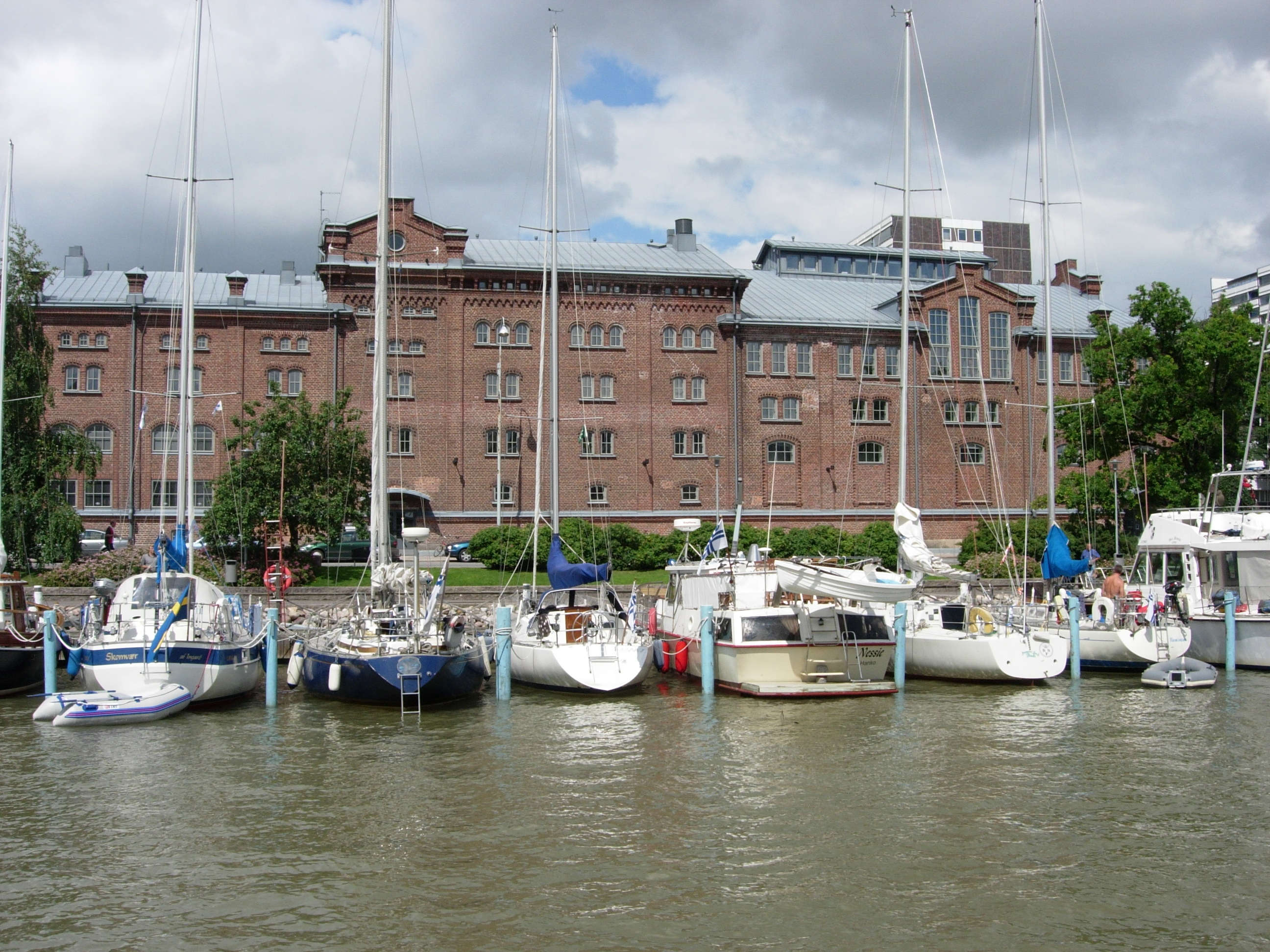 Auran panimo, Läntinen rantakatu 47, VIII kaupunginosa, Turku.